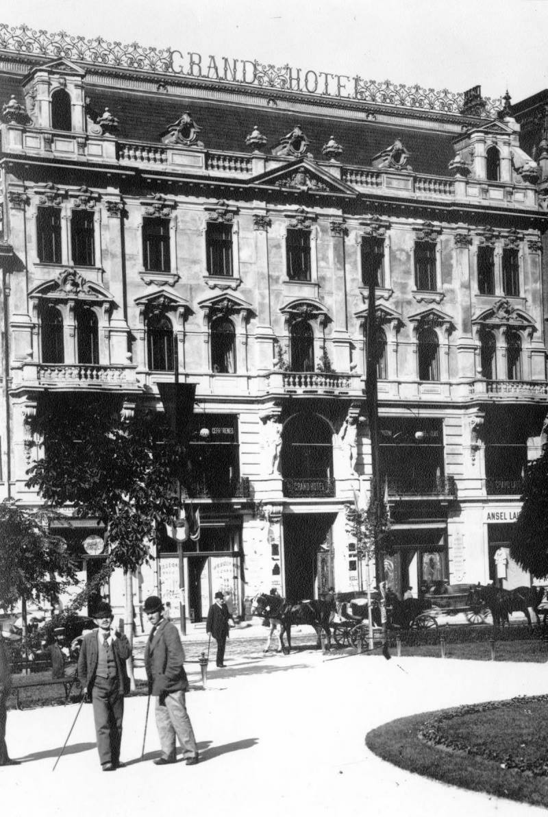 пр.Свободи